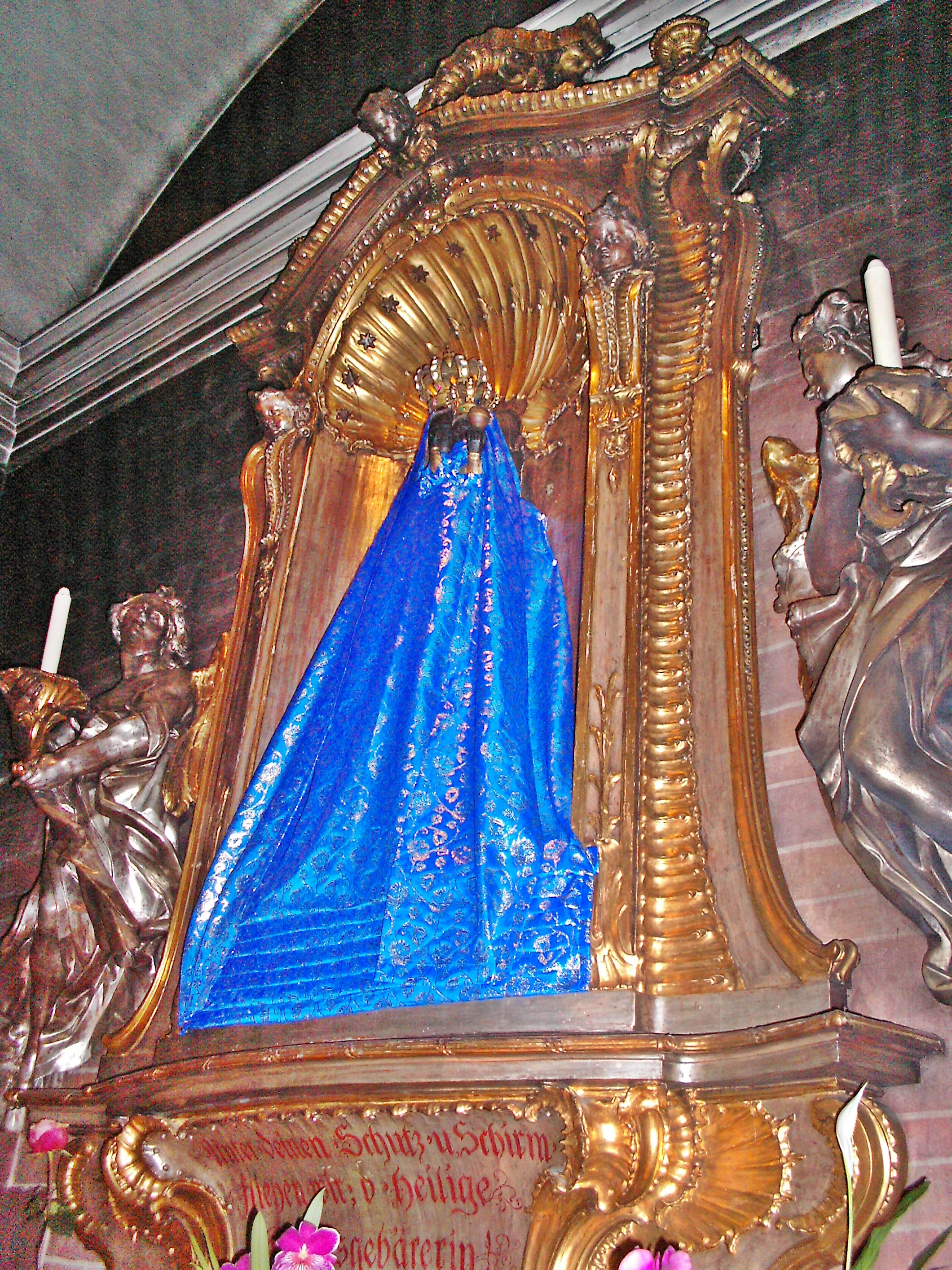 Wallfahrtskirche Ludwigshafen-Oggersheim, Gnadenbild